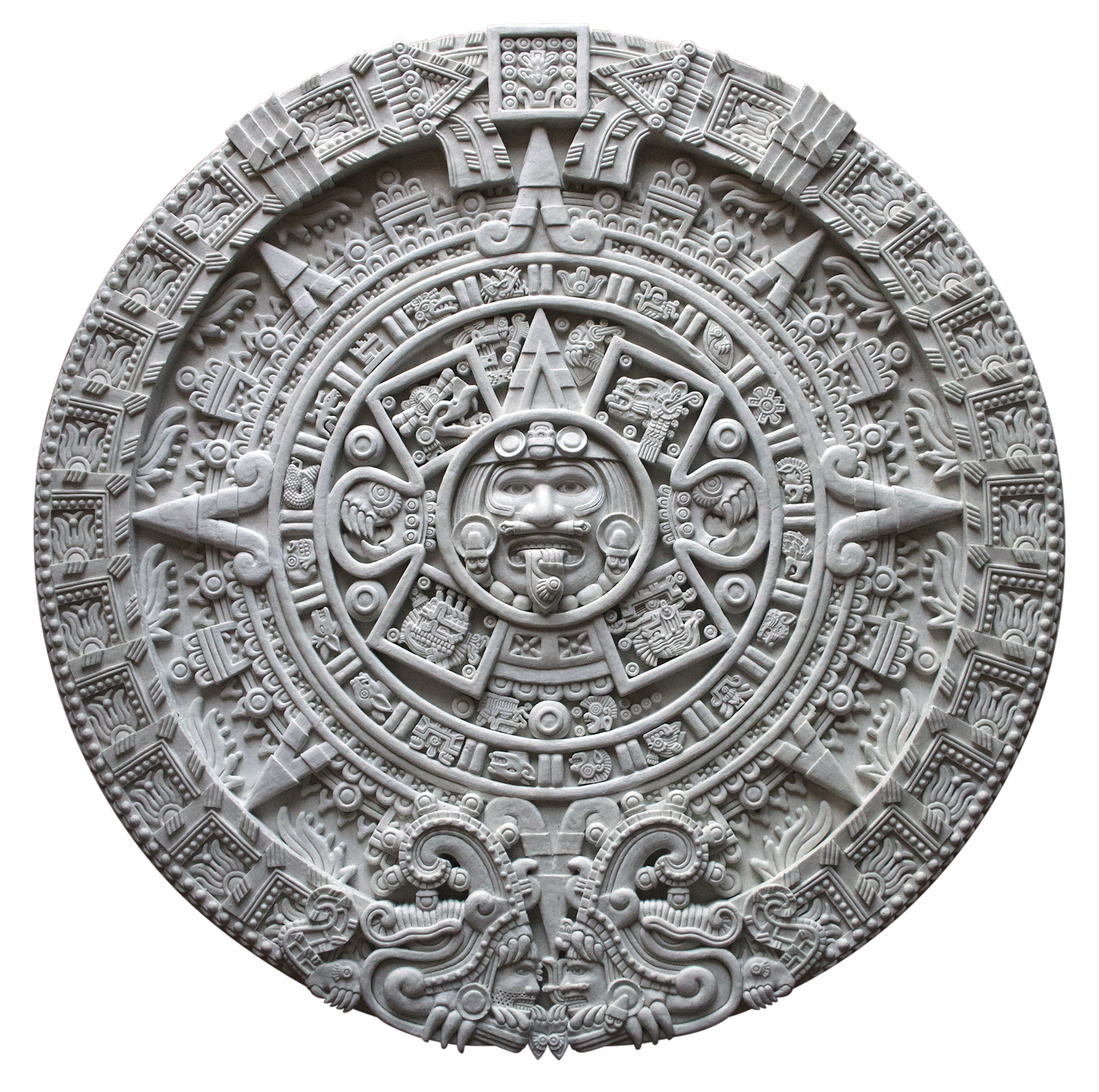 Aztec Calendar (Sunstone) reproduction